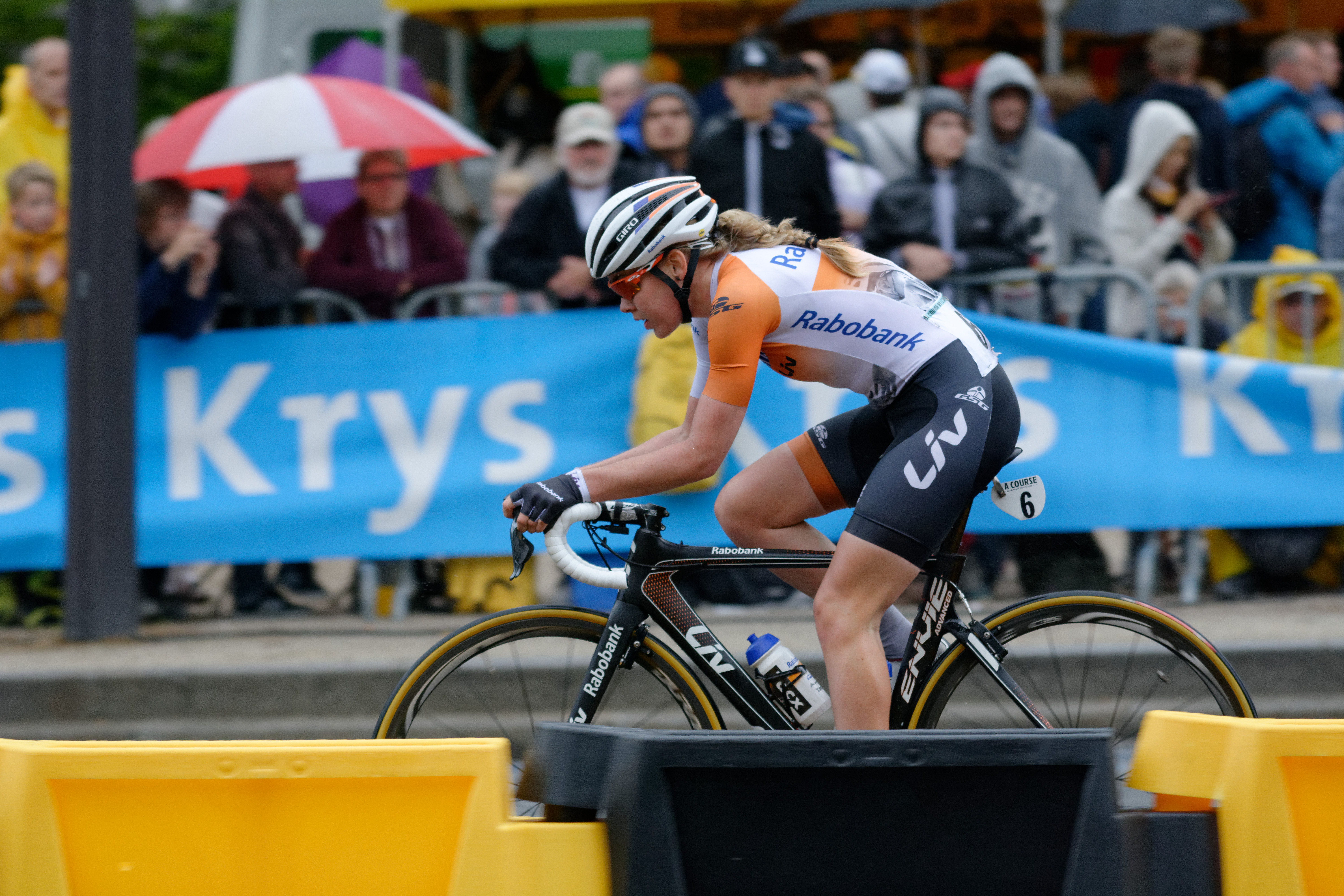 D71_2058_DxO